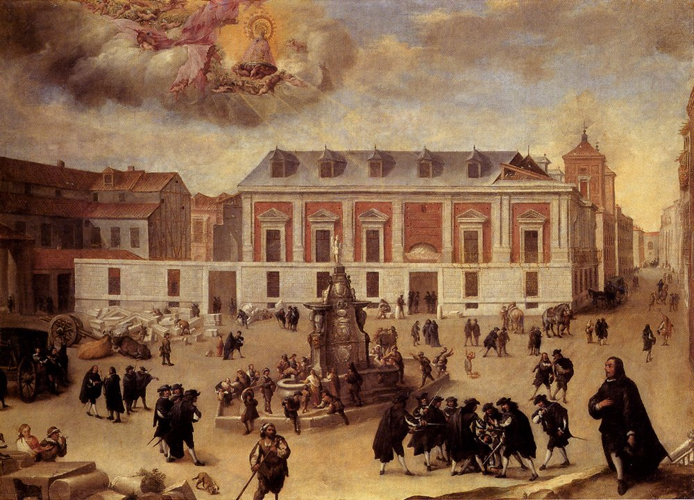 Oleo anónimo titulado “Milagro de la Virgen de Atocha en las obras de construcción de la Casa de la Villa” (1676-1700). Parece representar la intercesión milagrosa de la Virgen de Atocha para salvar a caballero de una emboscada en la Plaza de la Villa de Madrid (antes plaza de San Salvador). Se ve la Casa de la Villa (ayuntamiento) en construcción, y el pueblo 'masculino' de Madrid: caballeros, mendigos y aguadores alrededor de la fuente monumental diseñada por Rutilio Gaci e inaugurada en 1618, que hasta el siglo XVIII estuvo en esa plaza.